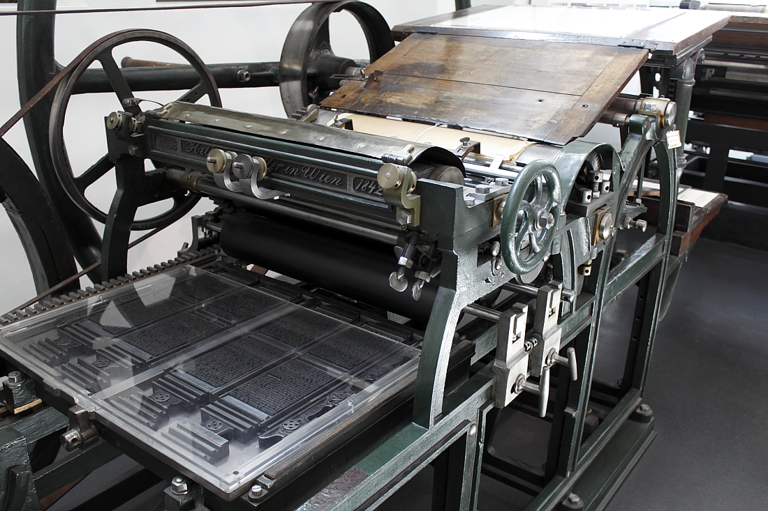 Hurtigpresse Helbig & Müller, Wien 1842 – (Deutsches Museum München)